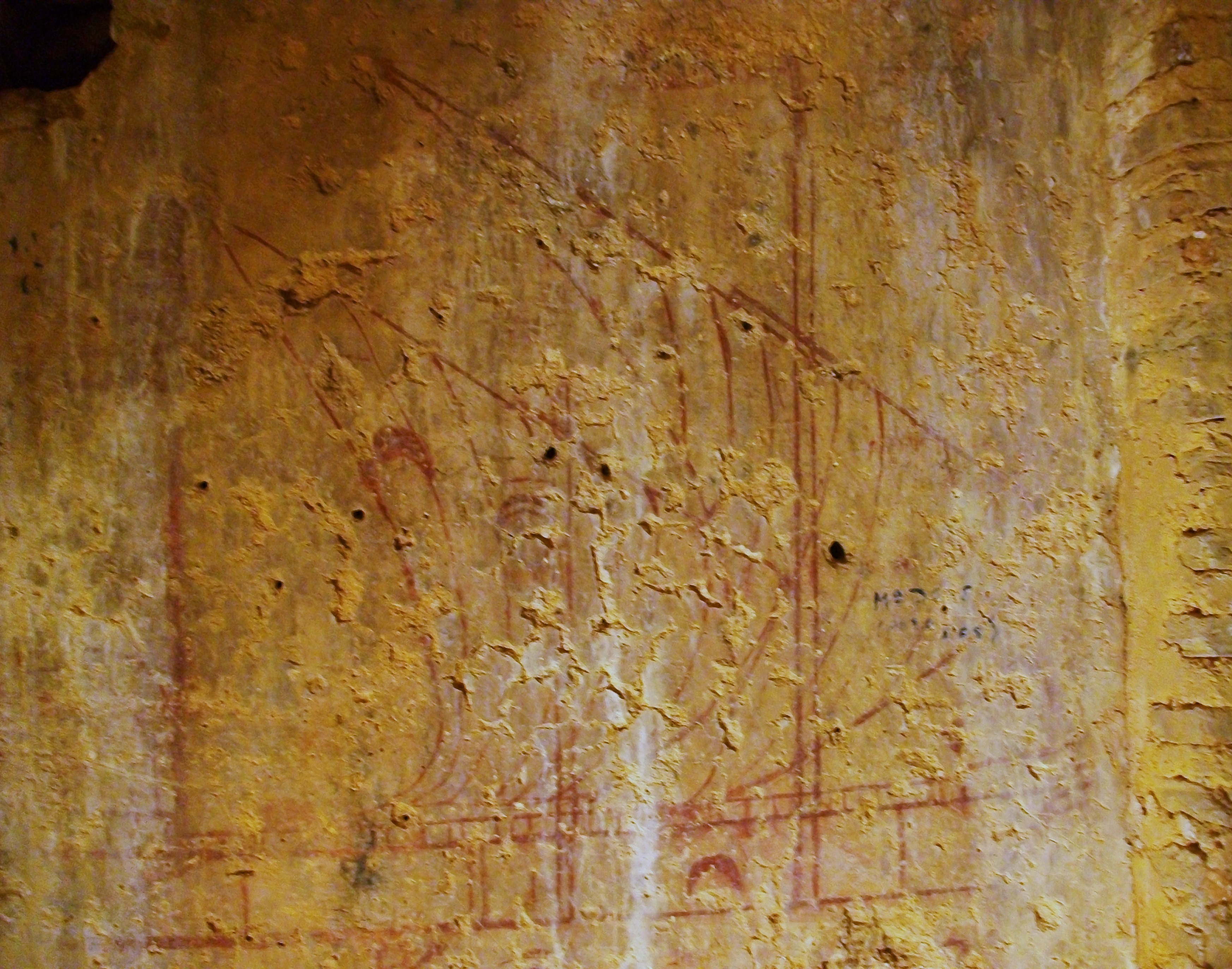 Dibuix d'un vaixell a l'interior del castell de Forna.